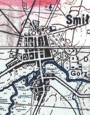 German_Map of_Smilaviczy_Bielarus; Сьмілавічы на нямецкай мапе 1930-ых гадоў